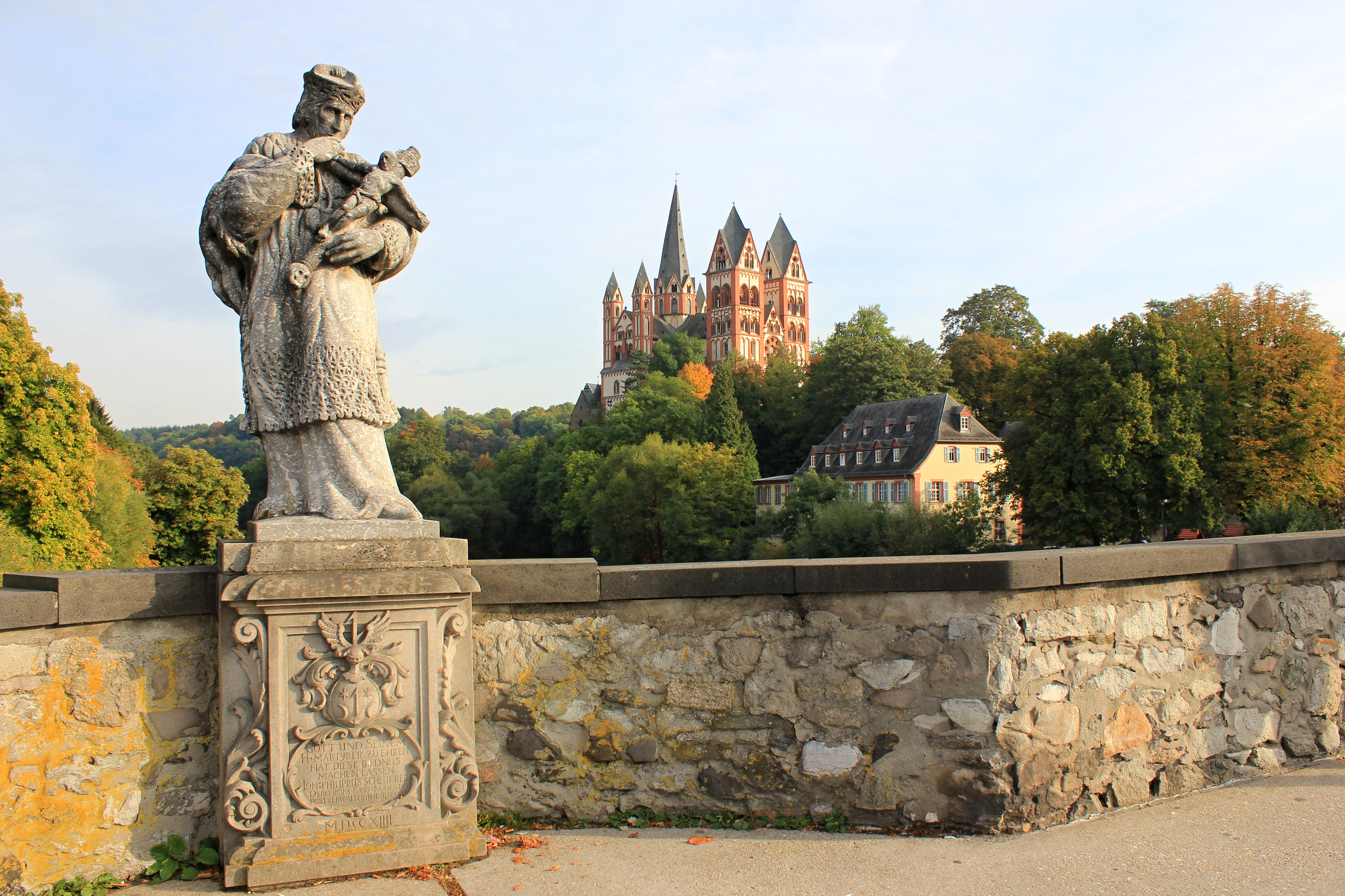 Die Nepomuk-Statue auf der Alten Lahnbrücke in Limburg an der Lahn. Im Hintergrund der Dom St. Georg und Nikolaus. Details 53076, 53176, 53174